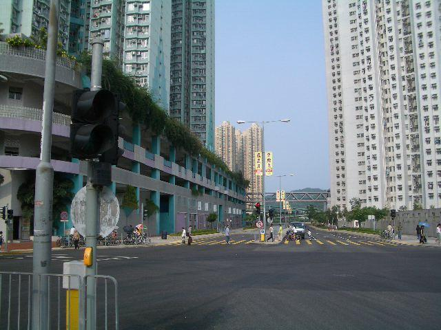 User:Kwan Zheung Laonnie: 將軍澳 Tseung Kwan O, Hong Kong